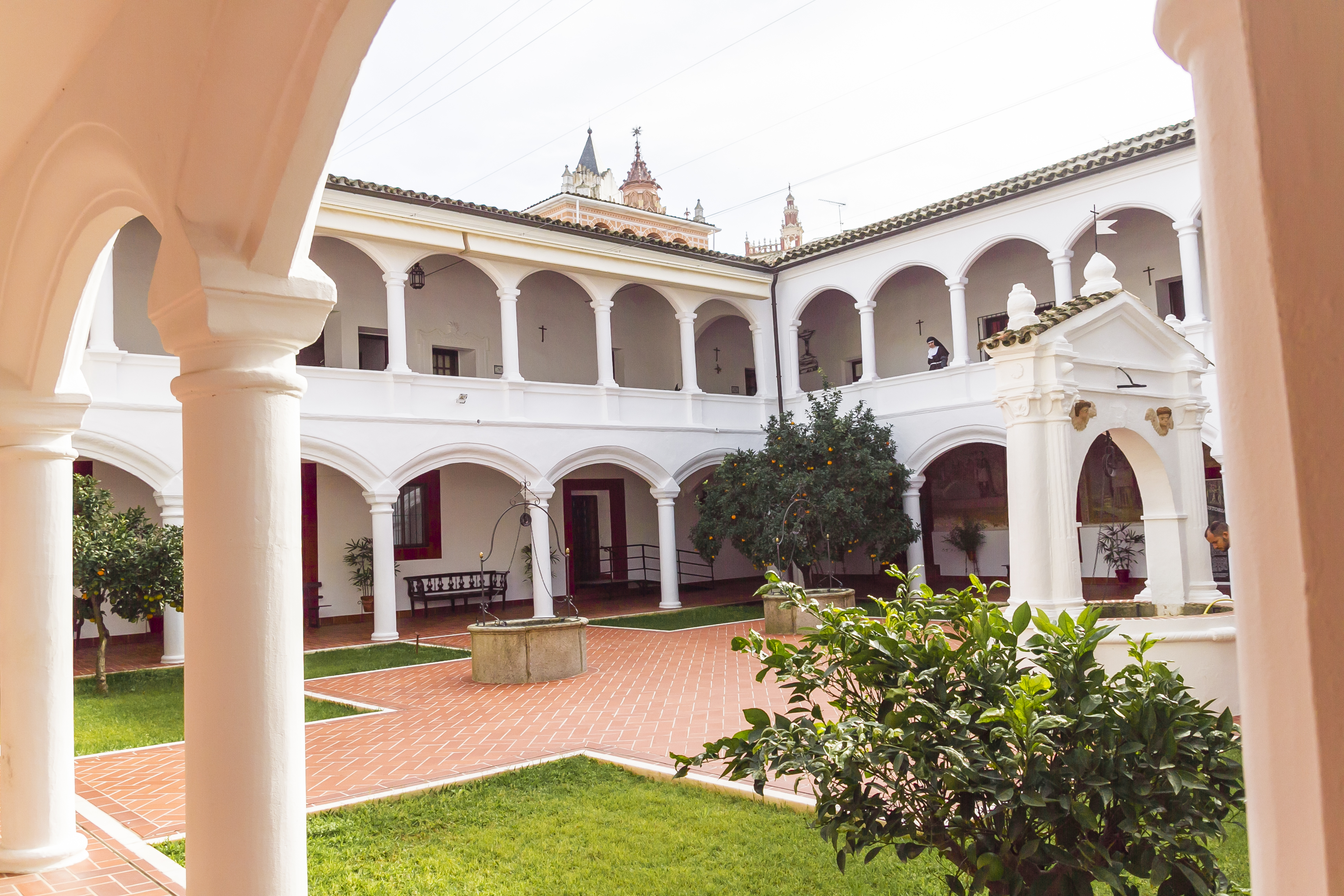 Claustro mudejar del Real Monasterio de Santa Ana en Badajoz